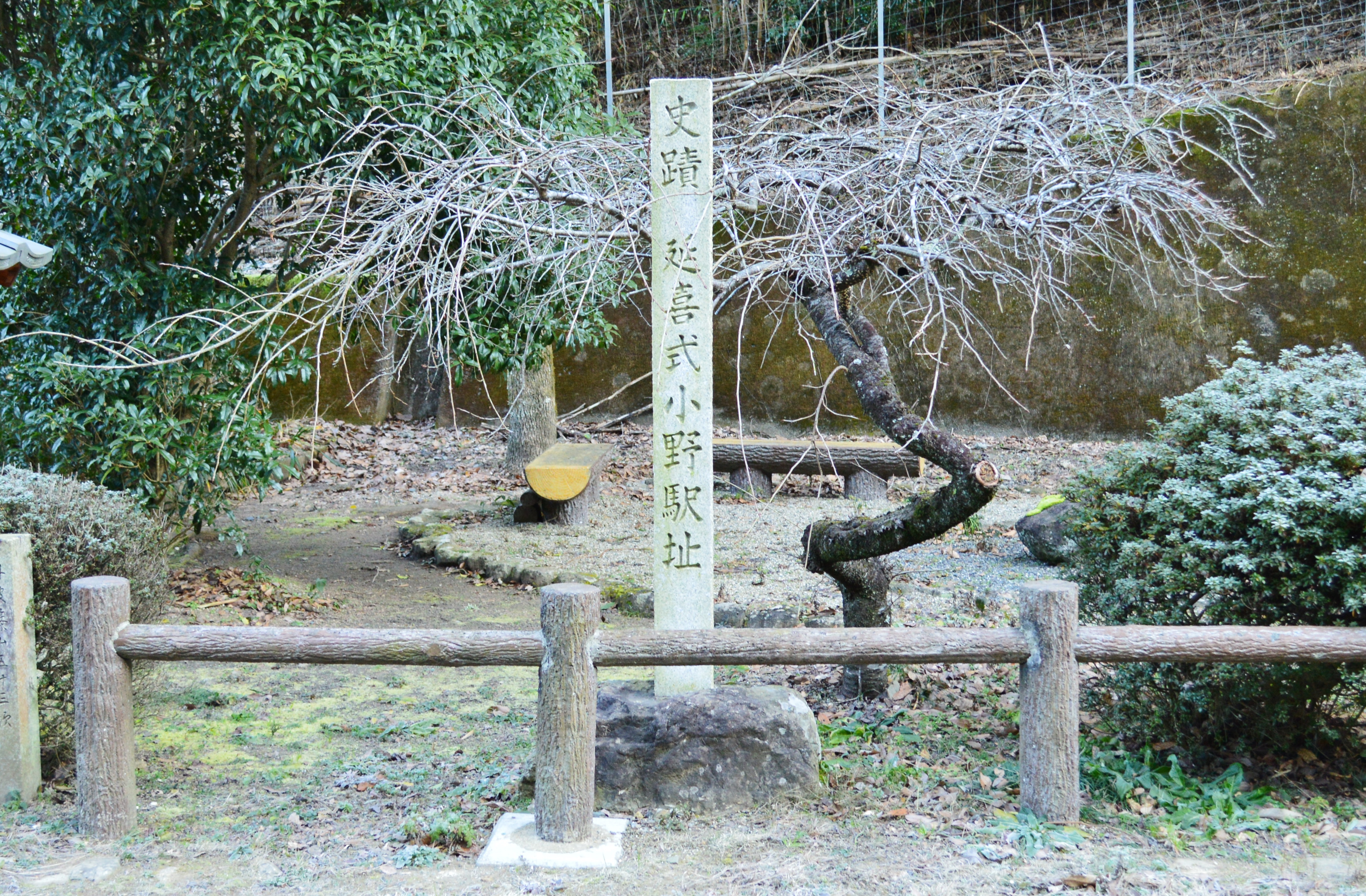 延喜式小野駅址碑